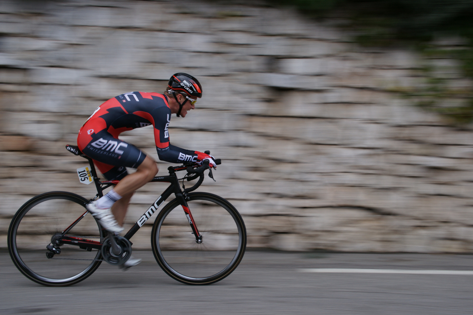 Dominik Nerz, Col d'Èze Paris-Nice 2013